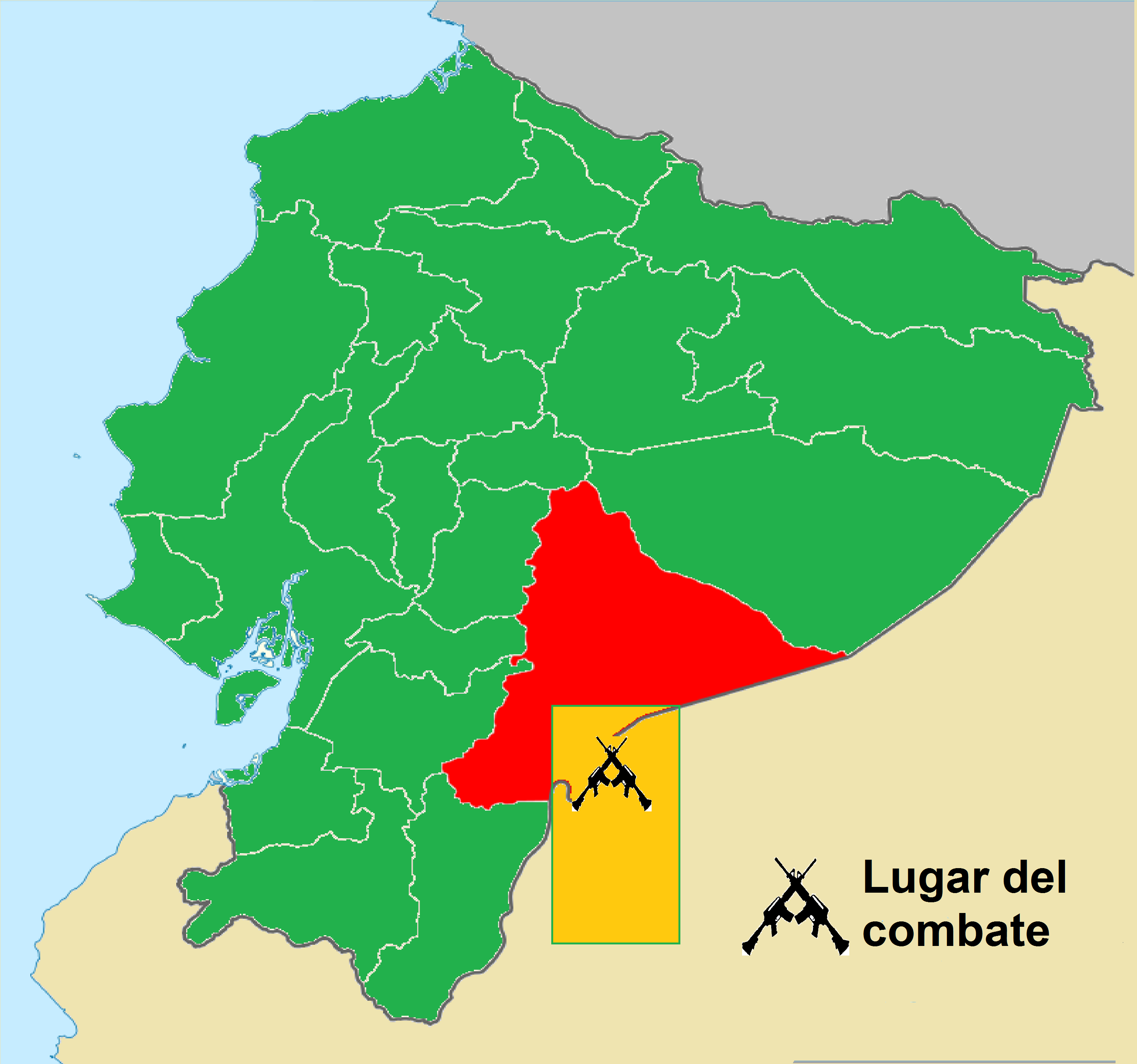 Ofensiva de Yaupi y Santiago con las fronteras actuales.